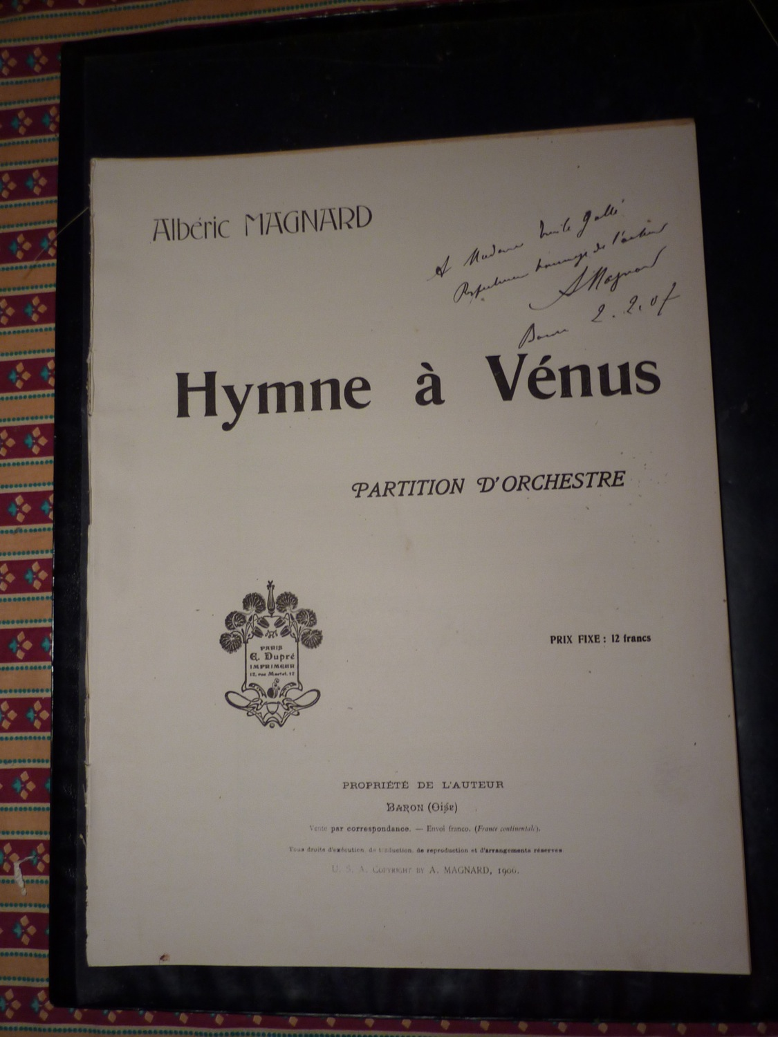 Partition dédicacée d'Albéric Magnard à la famille d'Emile Gallé.